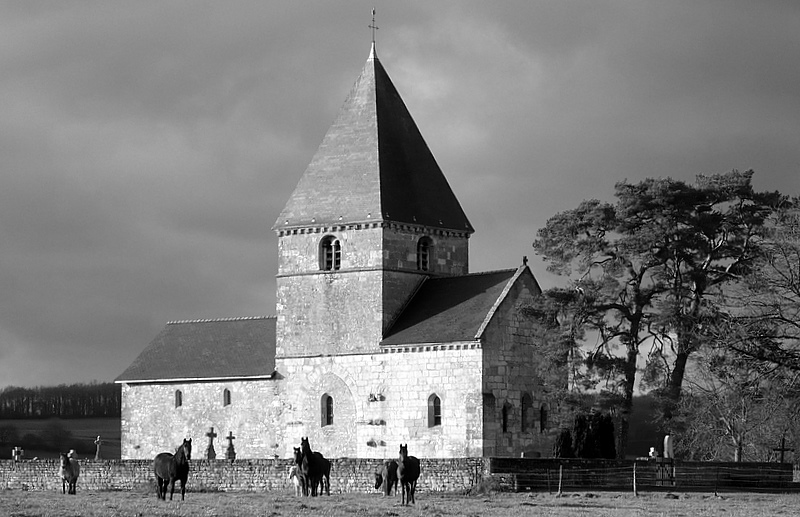 Eglise de Malmy (commune de Chémery-sur-Bar (Ardennes, Fr)